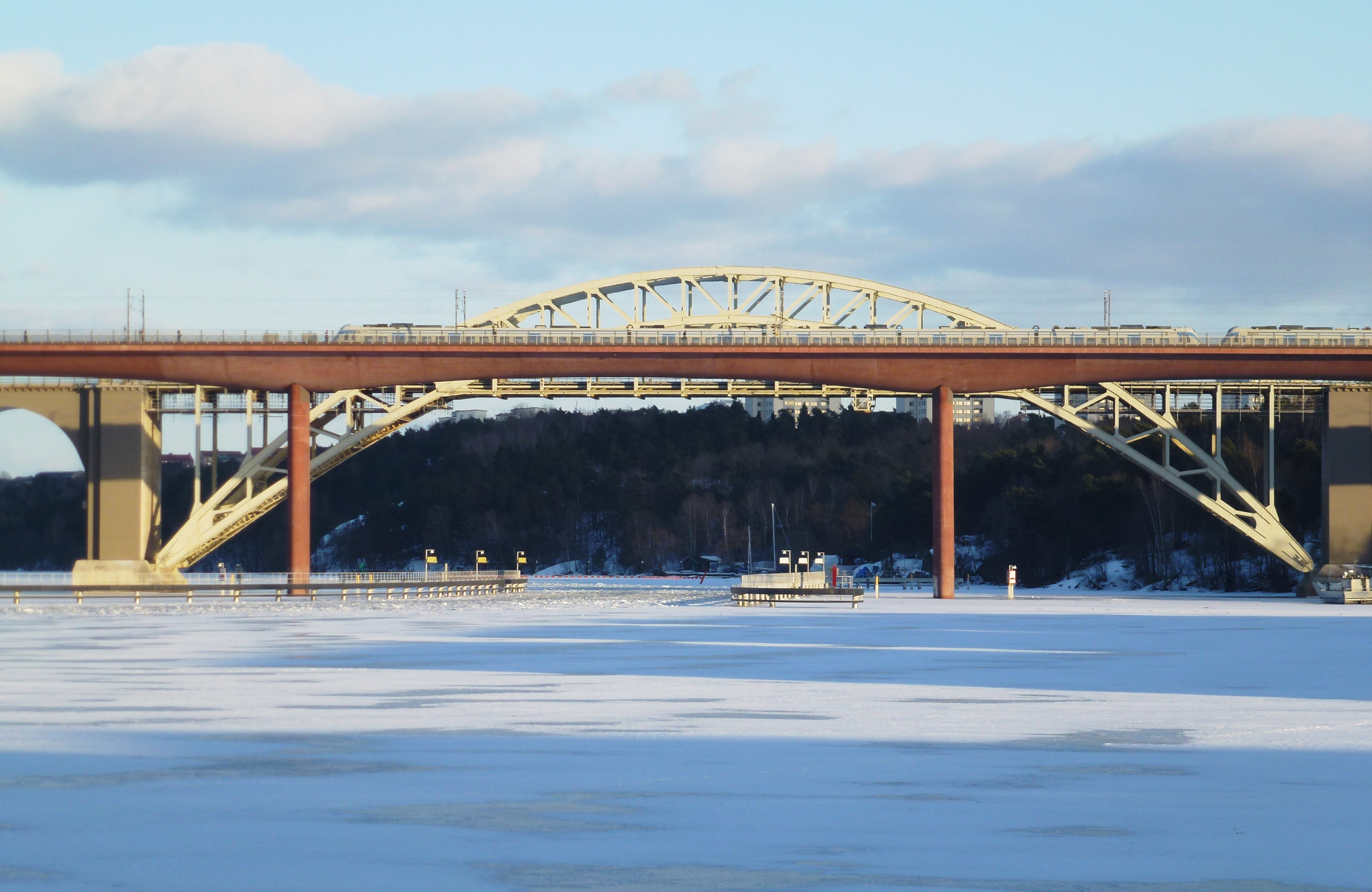 Årstabron